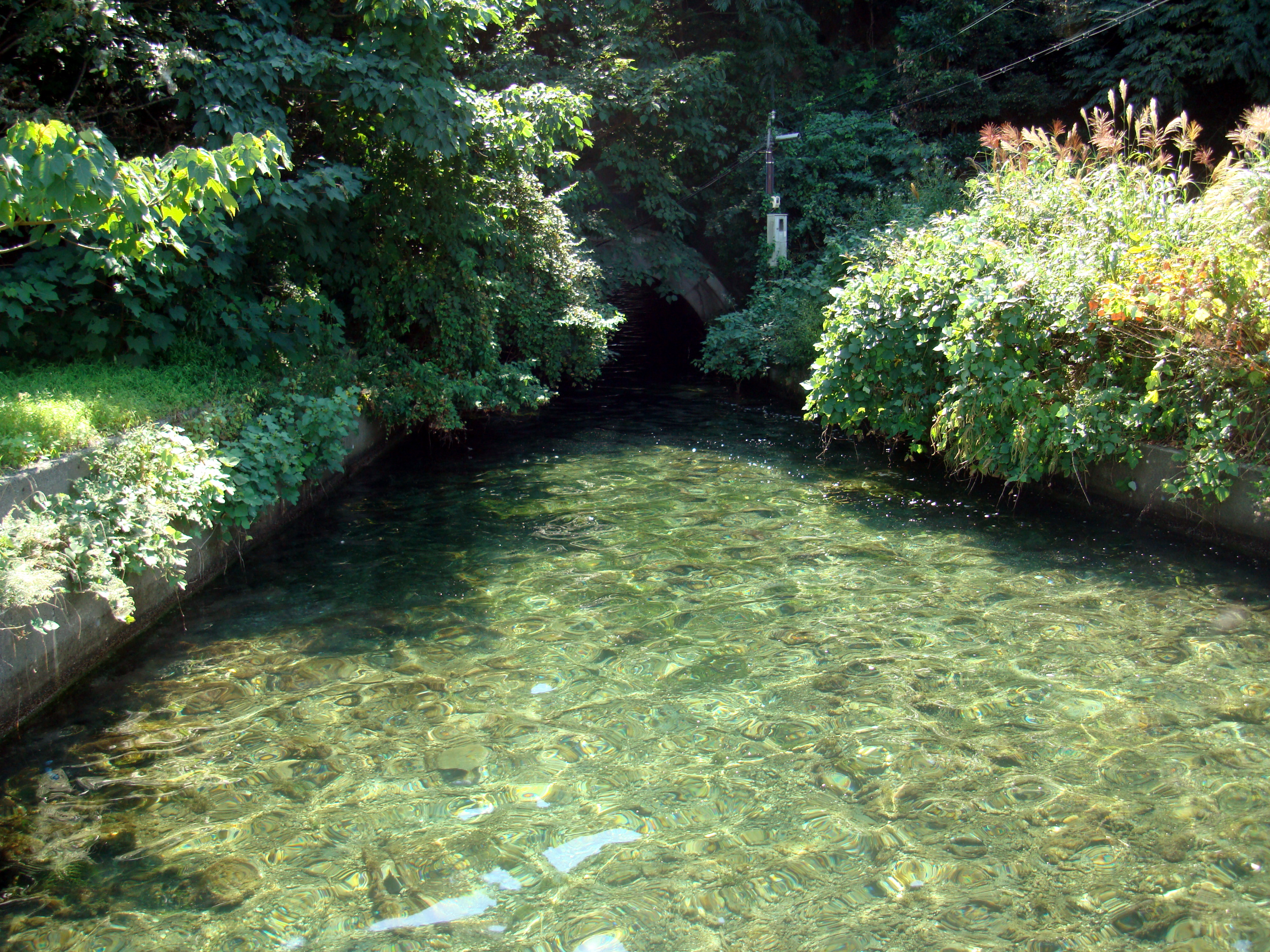 嵯峨隧道（日向湖側）